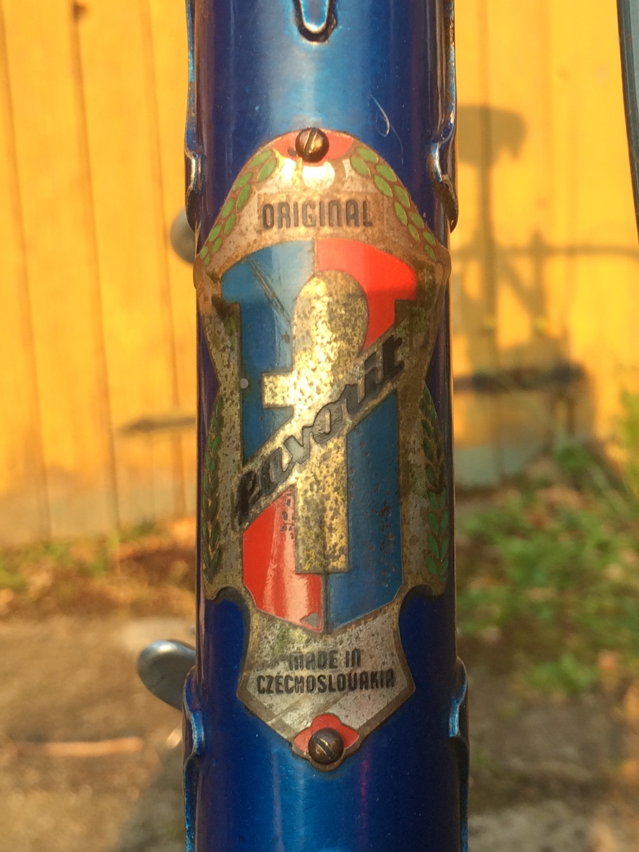 Stitek